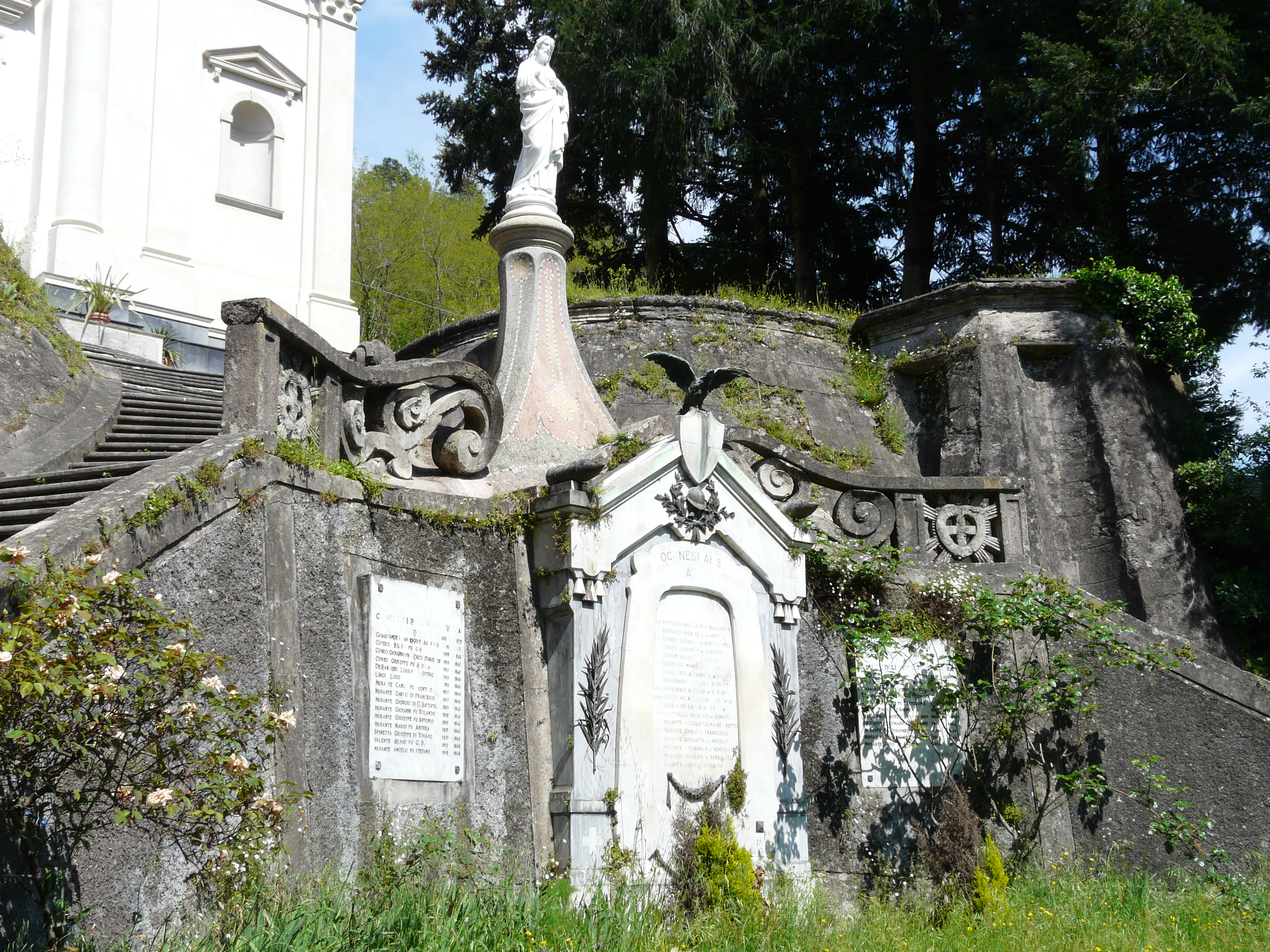 Monumenti ai caduti, Moconesi, Liguria, Italia